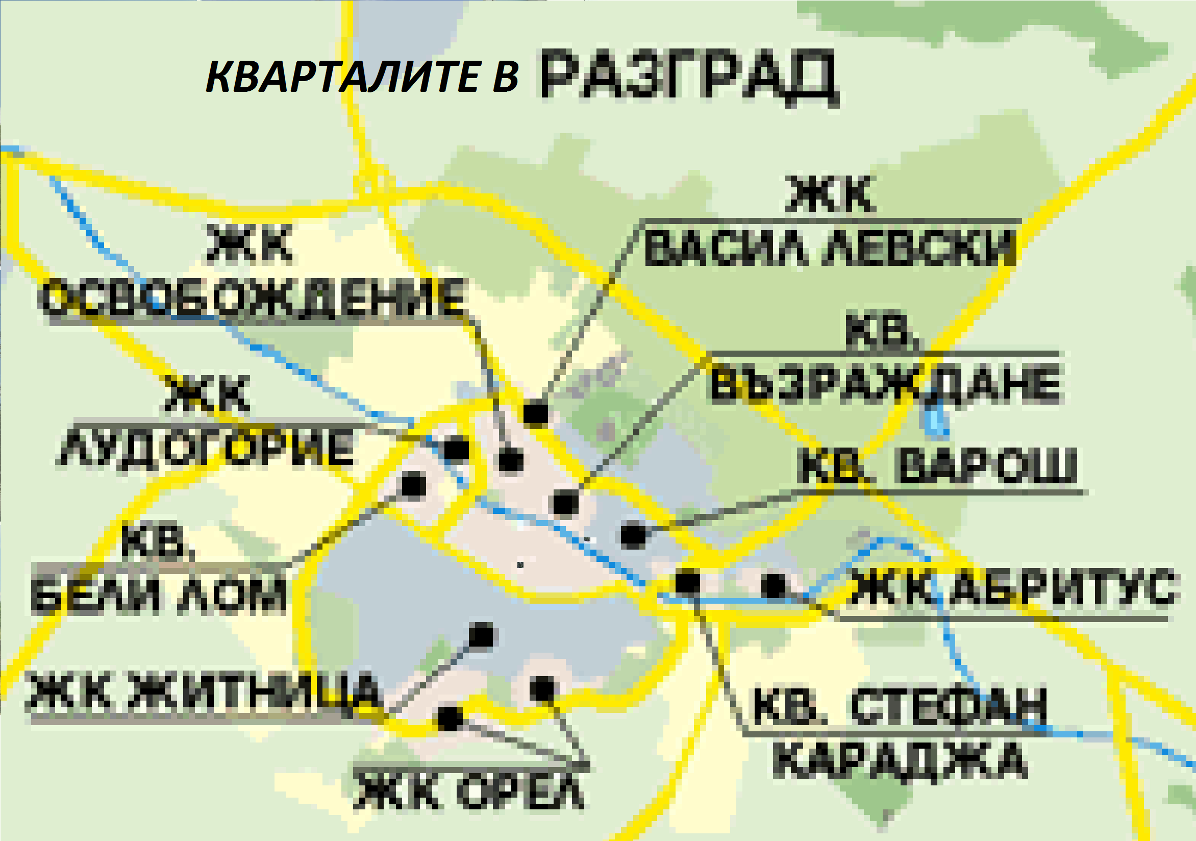 Кварталите в град Разград